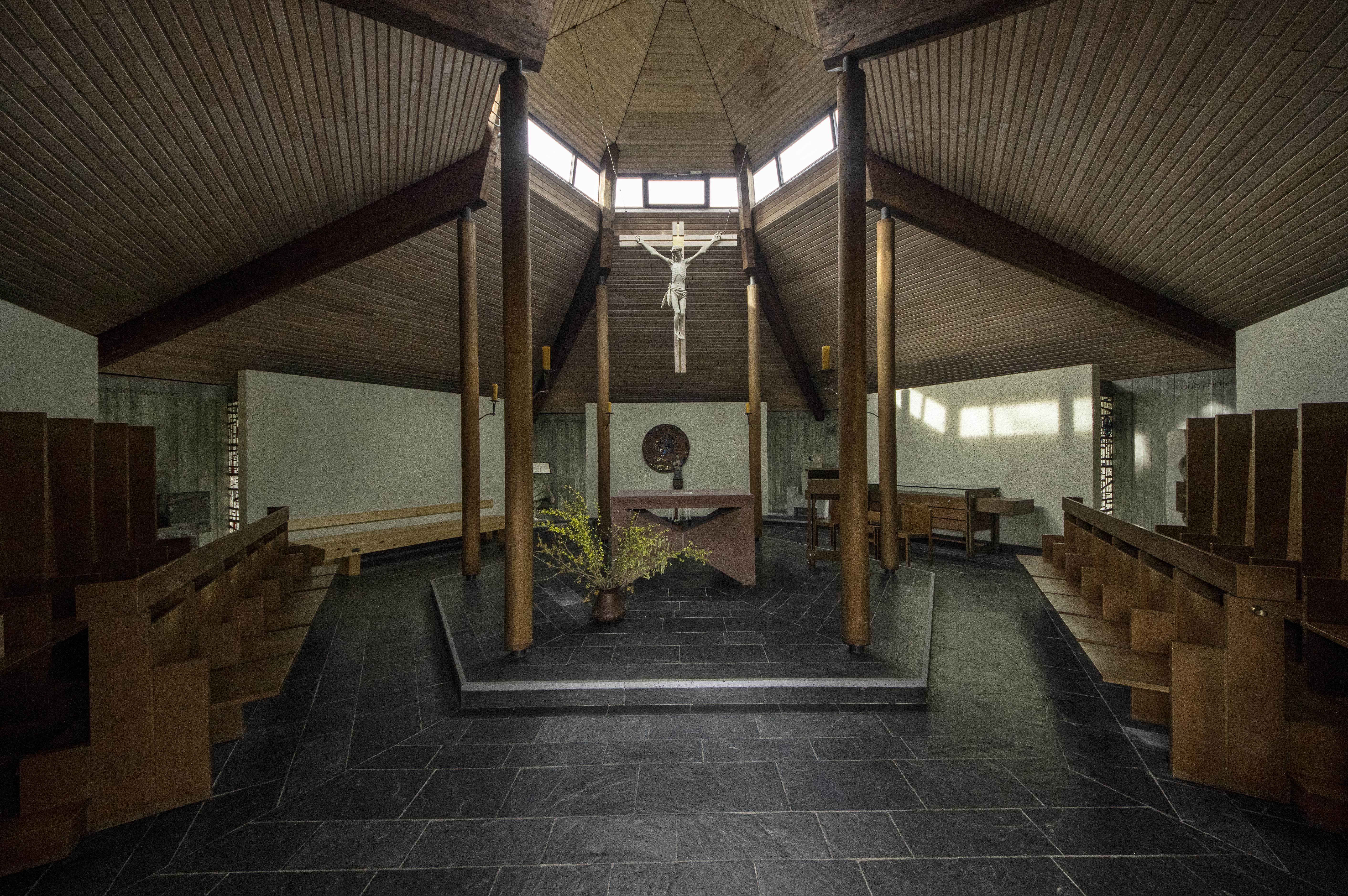 Bilder aus dem Ibental Blick ins Innere der Vaterunserkapelle im Ibental